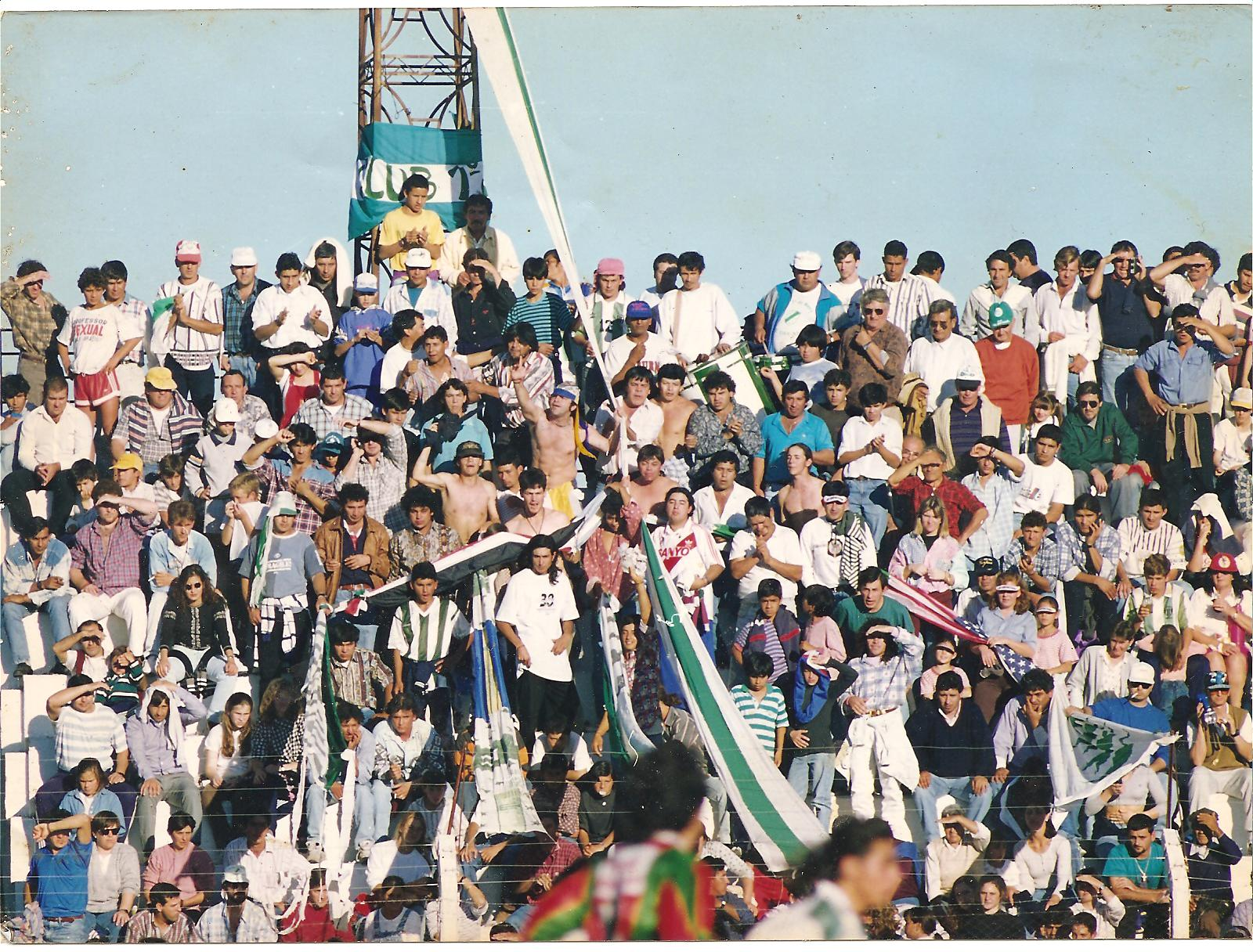 como siempre inigualable!!!